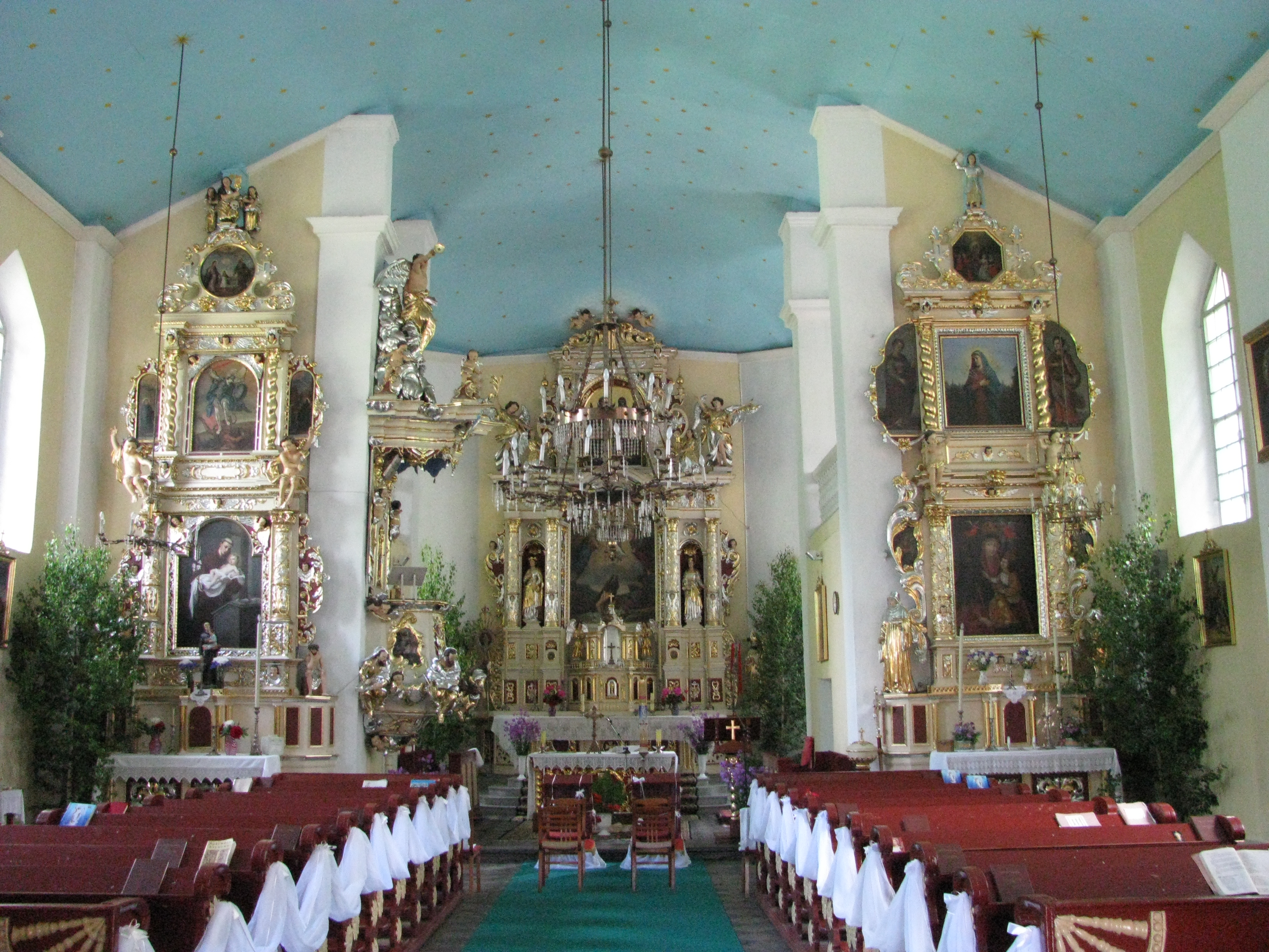 Беларуская (тарашкевіца): Праабражэнскі касьцёлдэкаратыўнае ўбраньне: альтары, амбон, арган. в. Новая Мыш This is a photo of Belarusian heritage monument. Reference number: 112Г000060 ( WLM)